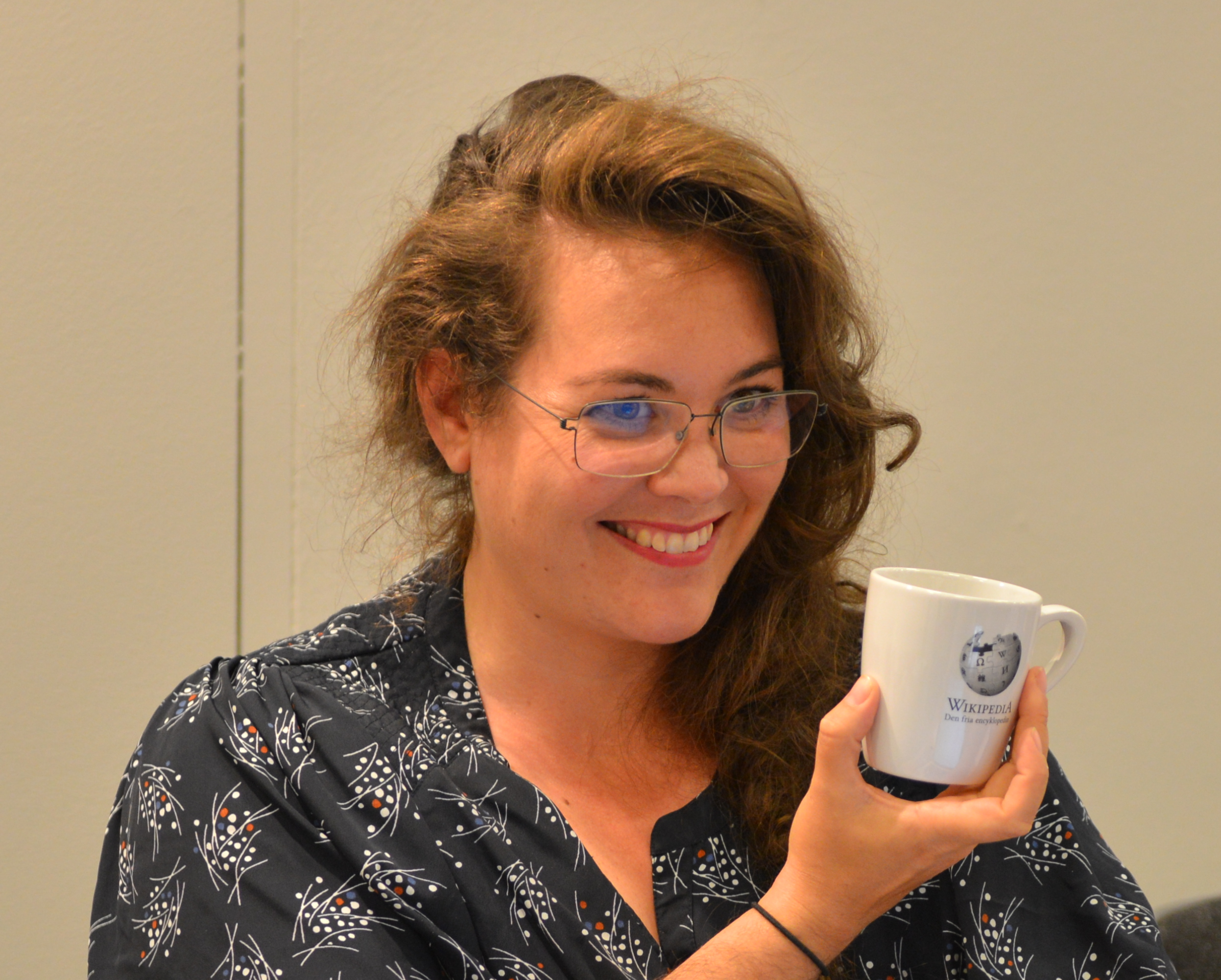 EvaMarie Lindahl besöker Wikimedia Sveriges monter under Nordiskt Forum på Malmömässan 2014. EvaMarie har en Wikipediamugg i handen.